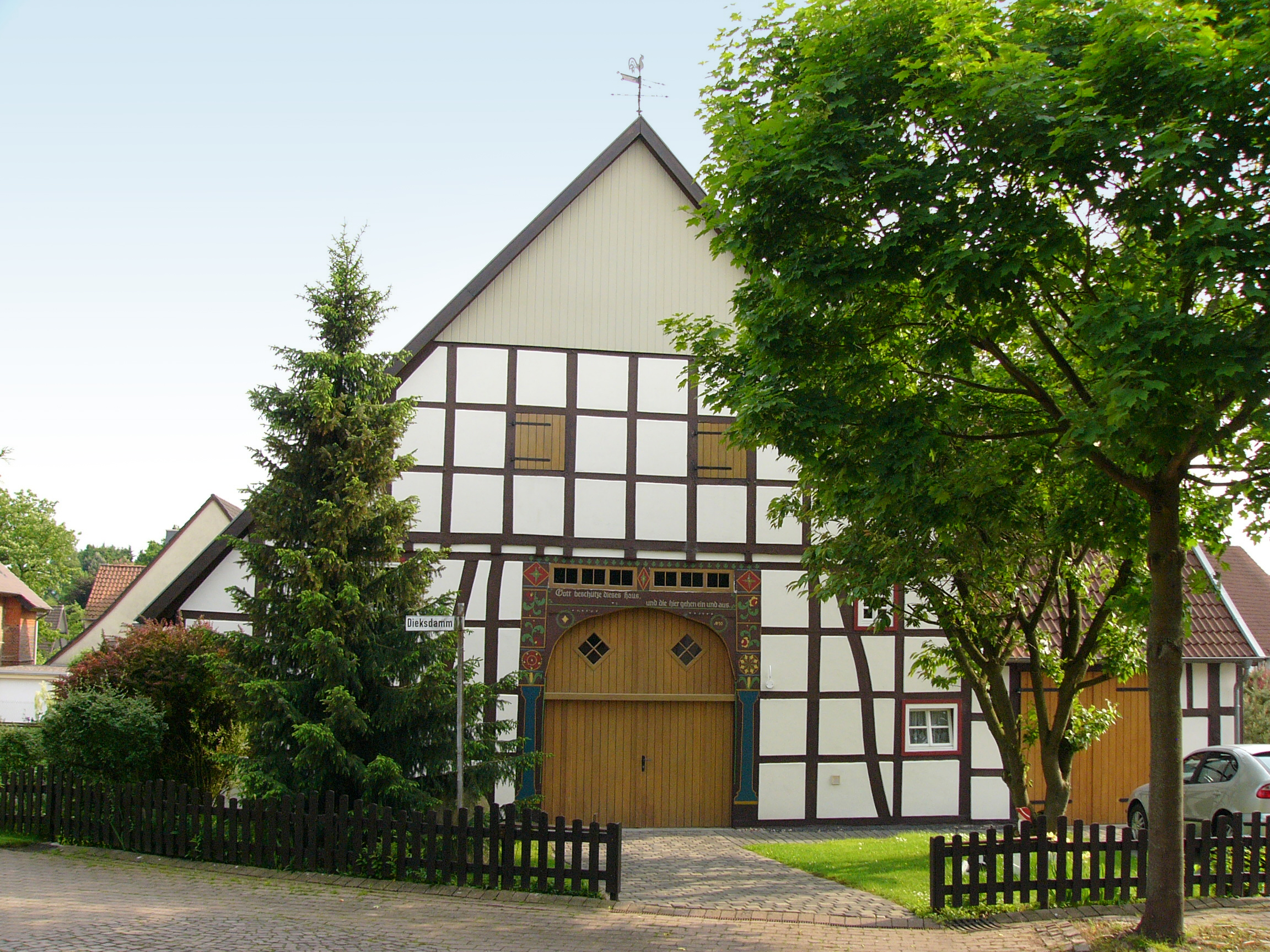 Fachwerkhaus Ortsstraße in Wellentrup, Ortsteil von Blomberg